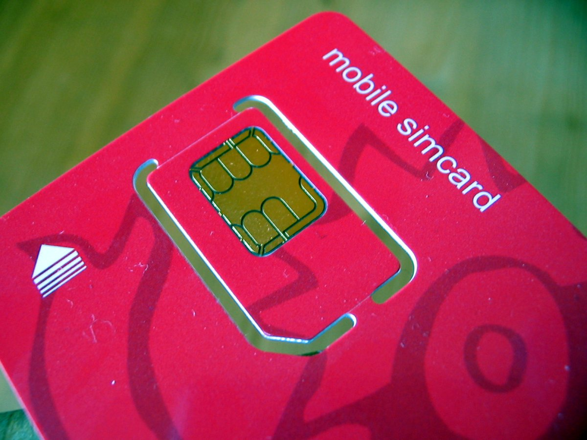 a SIM card